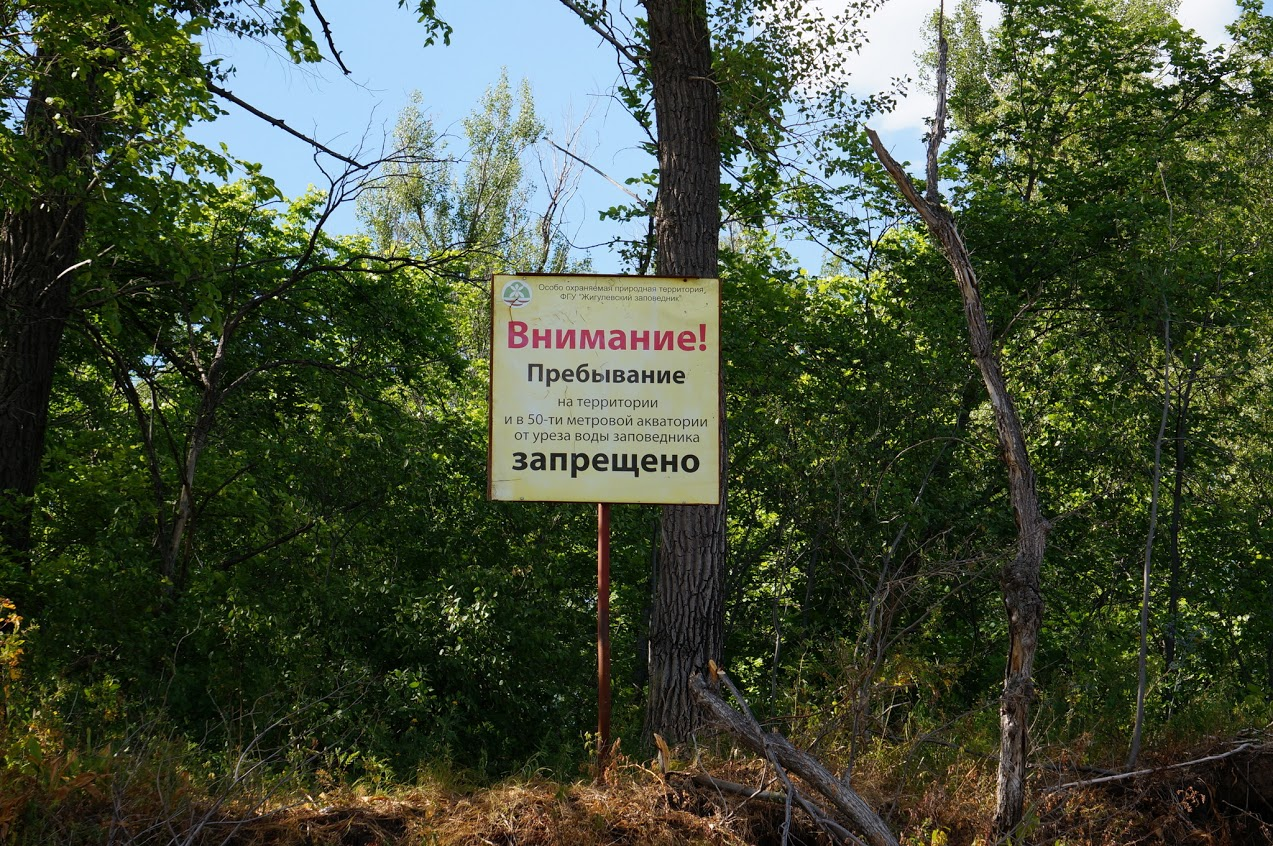 Протока Кольчужная на заповедном волжском острове Серёдыш.